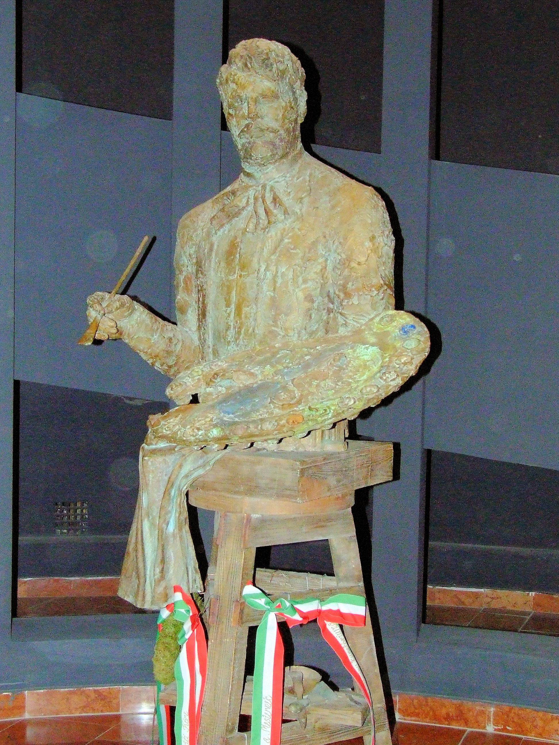 Feszty Árpád szobra az Ópusztaszeri Nemzeti Történeti Emlékparkban